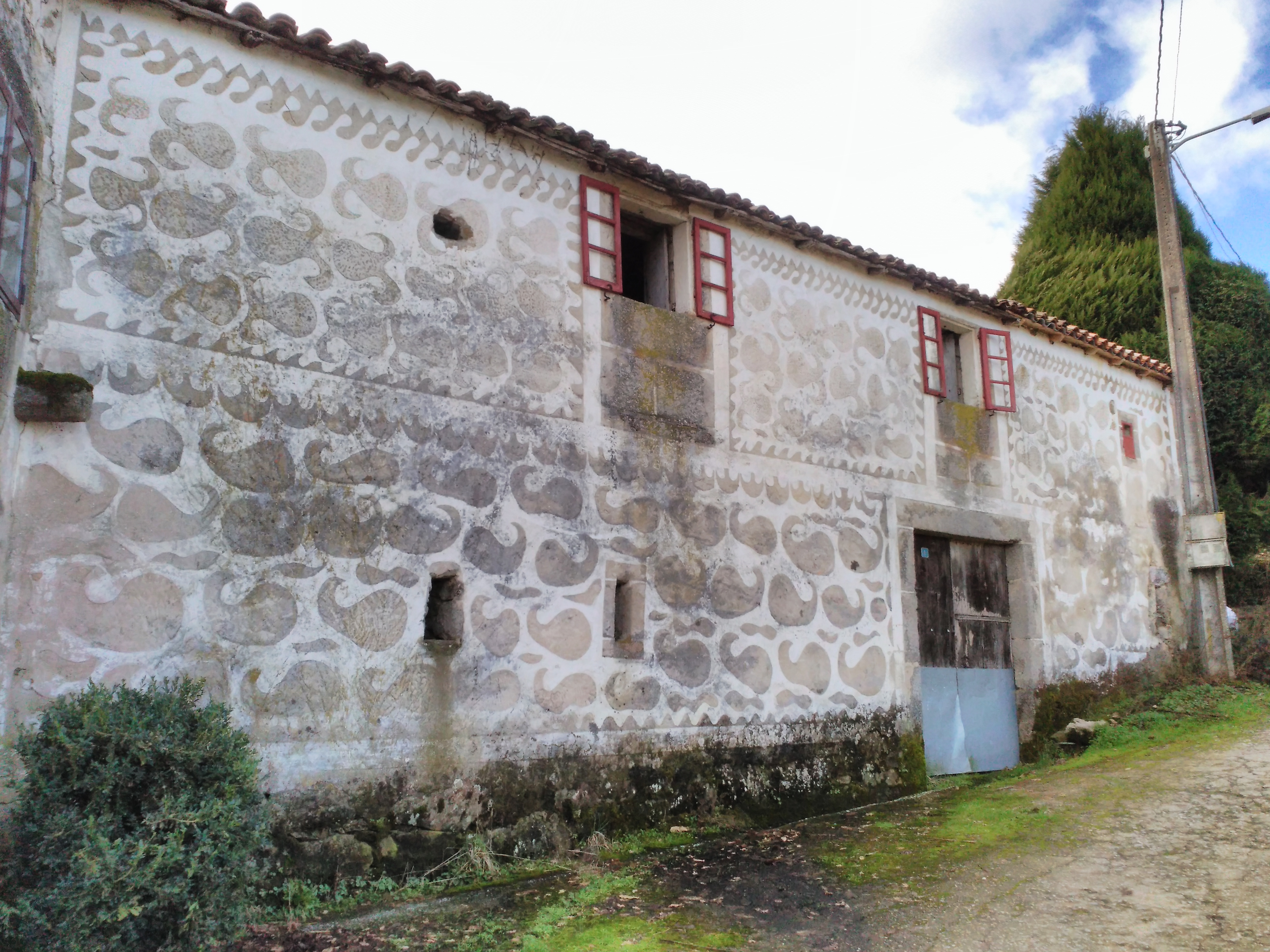 Esgrafiados en San Lourenzo de Gondulfe (Taboada, provincia de Lugo), na Ribeira Sacra